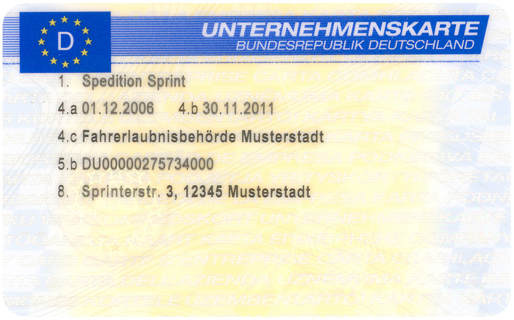 Muster einer deutschen Unternehmenskarte für das Kontrollgerät im Straßenverkehr gemäß Verordnung (EG) Nr. 2135/98, Vorderseite